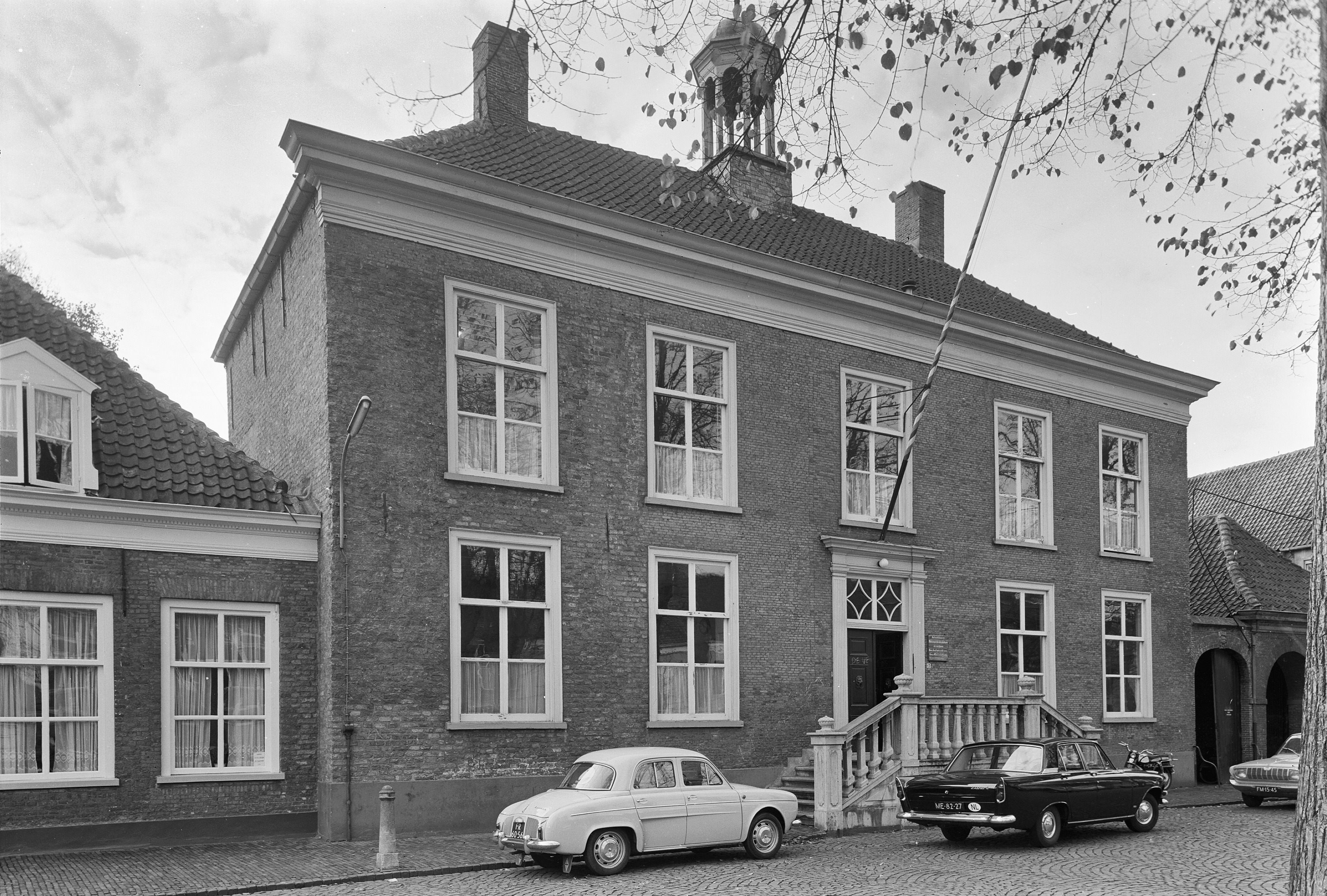 Vrijheidshuis: voorgevel